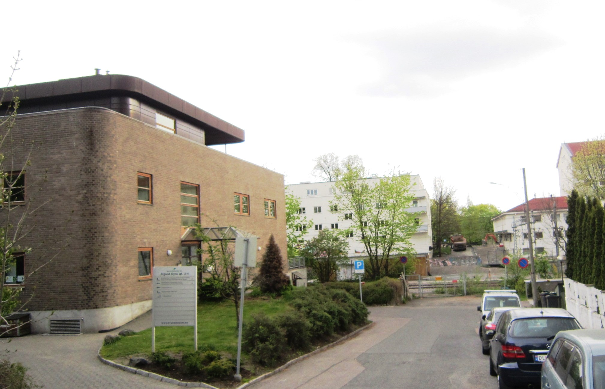 Sigurd Syrs gate i Oslo